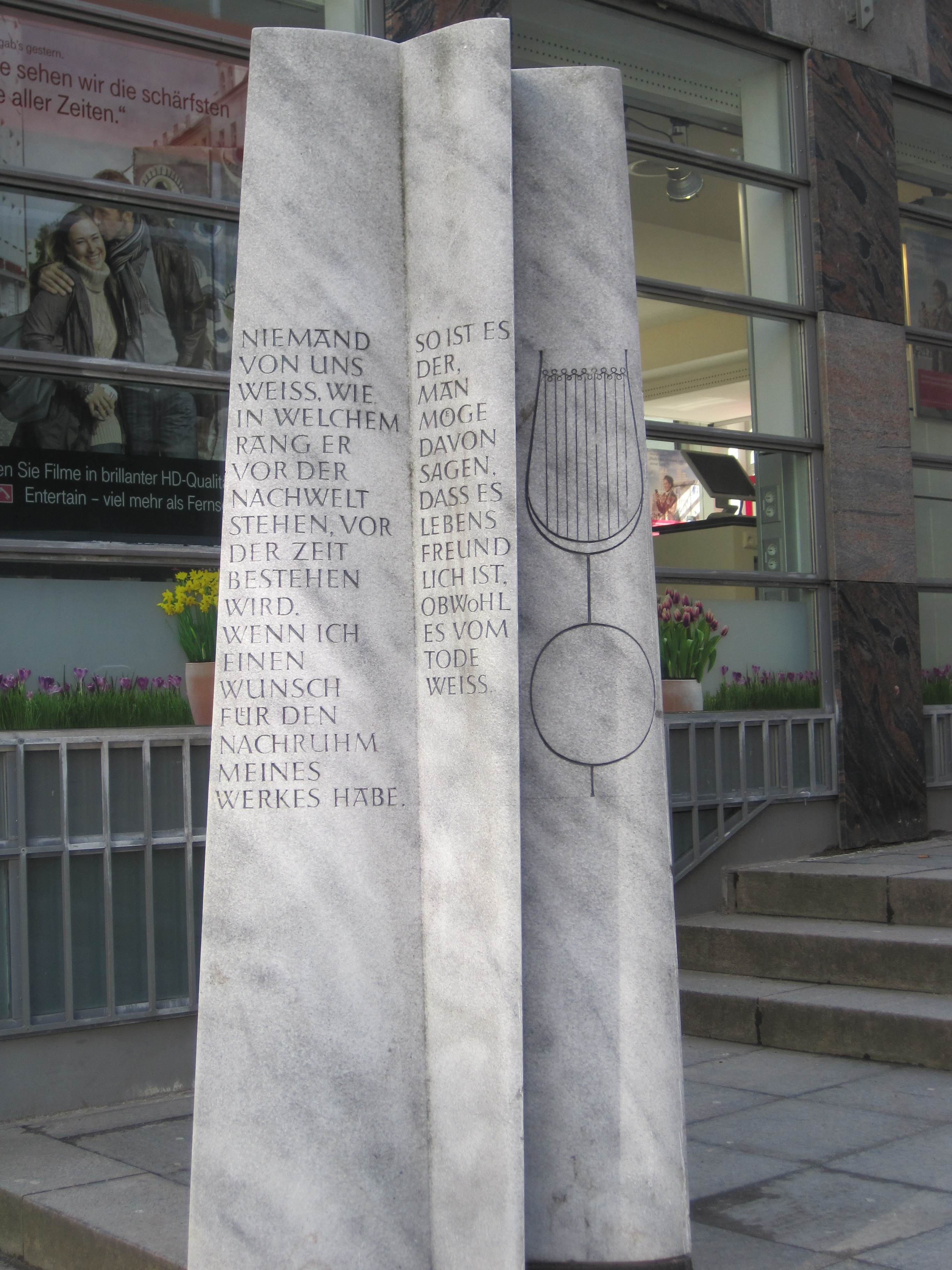 Thomas Mann Stein in Lübeck, entstanden 1975. Bildhauer Ulrich Beier. Ecke Beckergrube/Breite Straße in Lübeck.